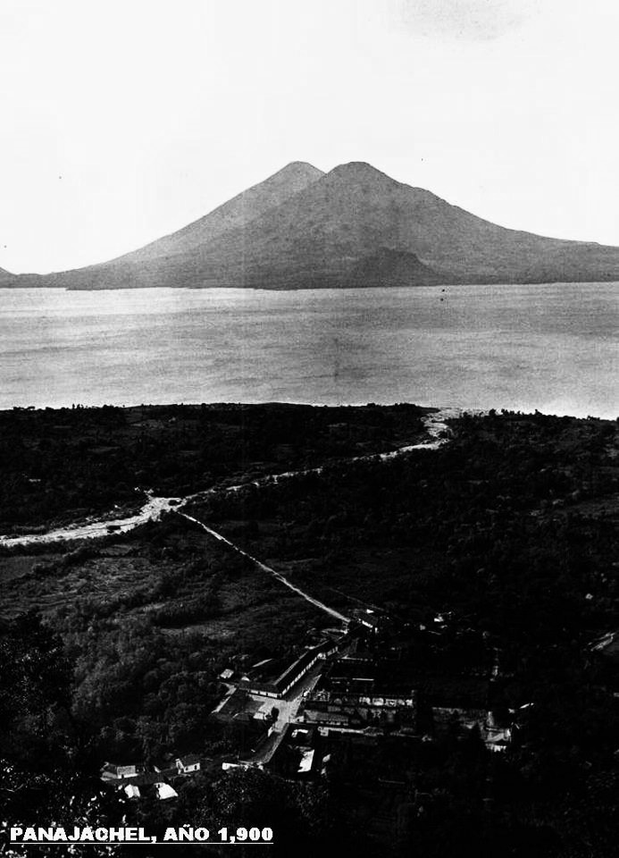 Lago de Atitlan y Panajachel en 1900.